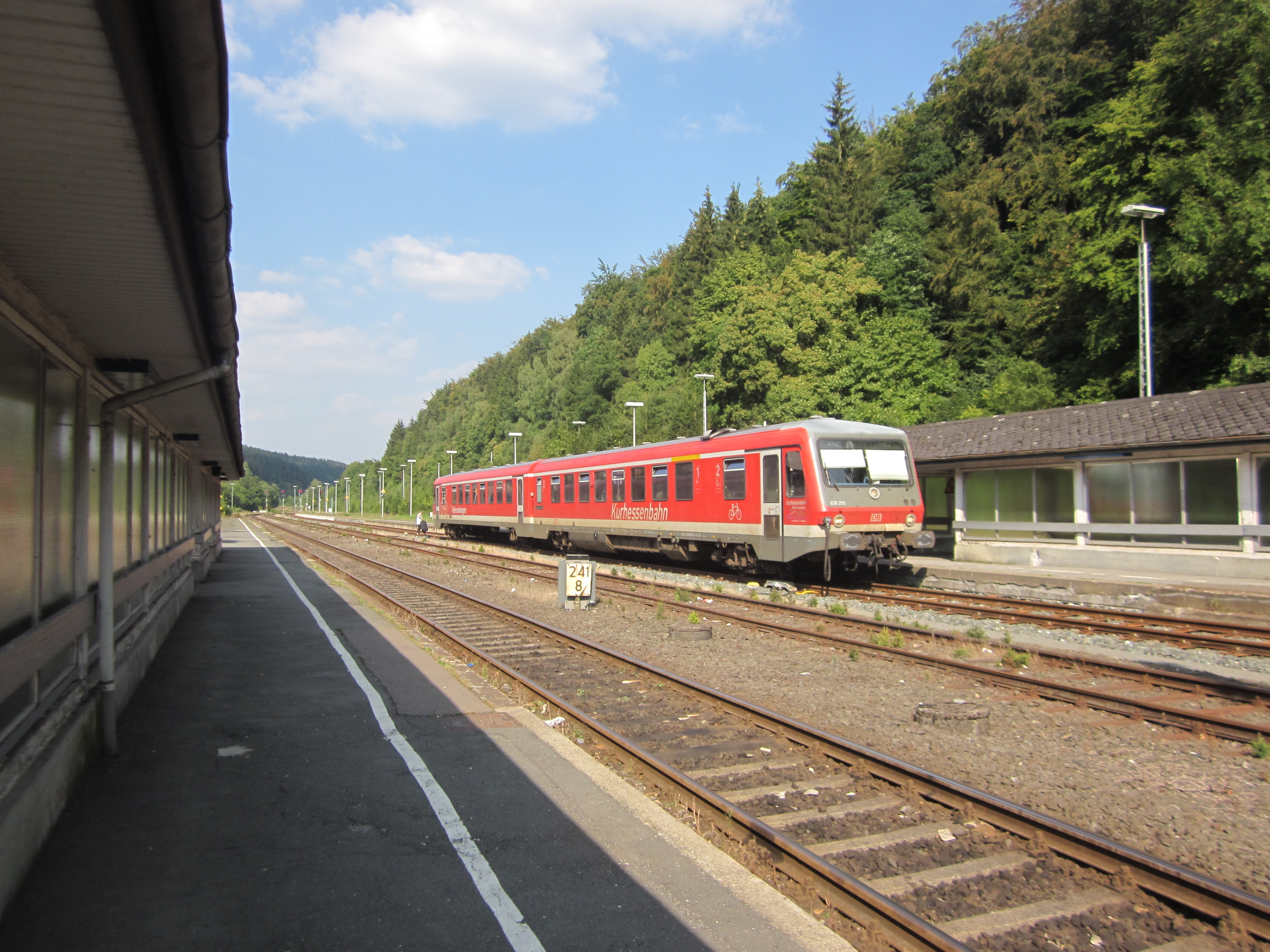 Triebwagen 628 255 der Kurhessenbahn in Brilon Wald auf dem Weg über Korbach nach Marburg